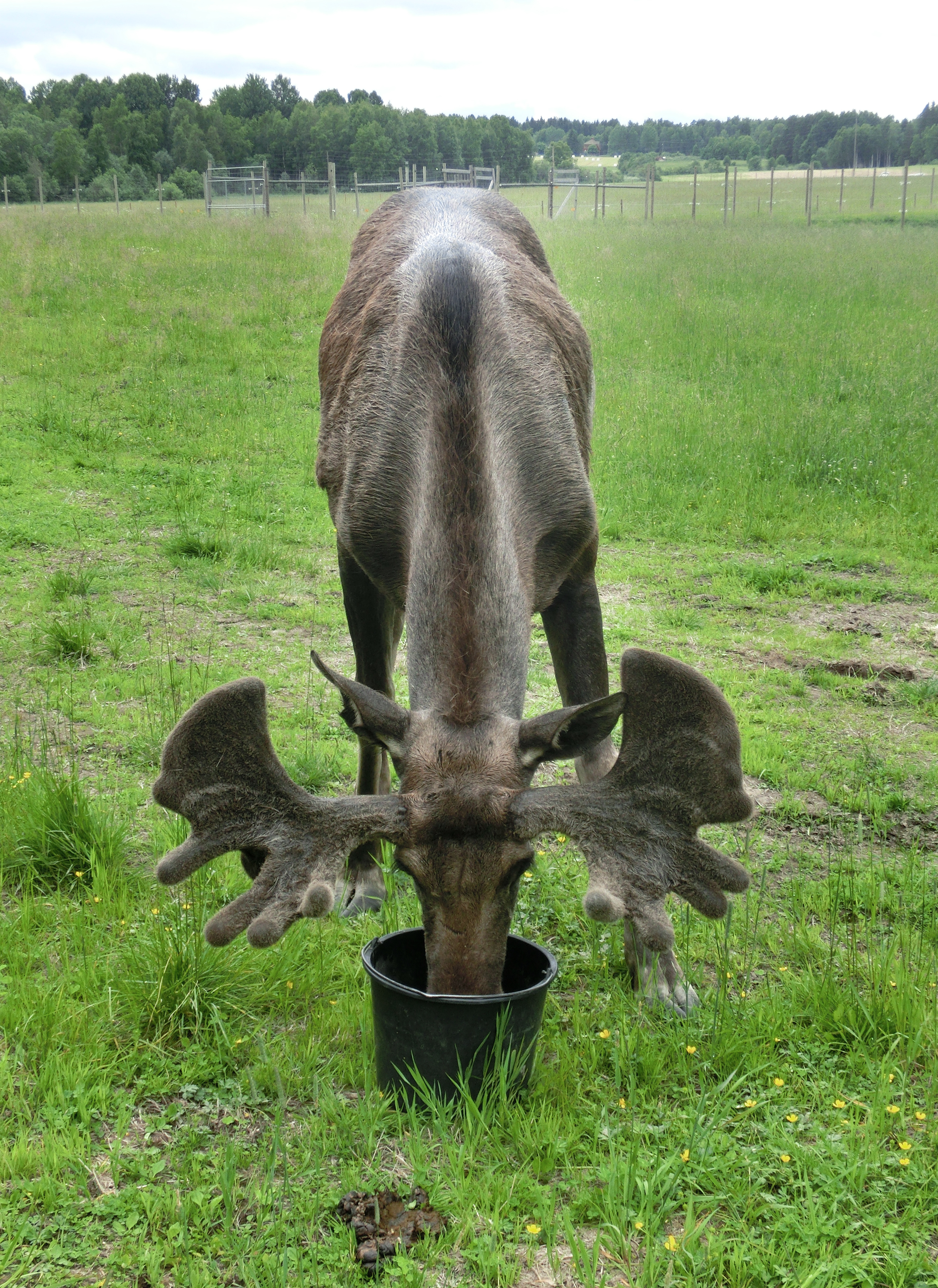 Älgtjur (Alces alces alces) i Gårdsjö älgpark, Västerlövsta socken, Heby kommun, Uppsala län, Uppland, Sverige. Troligen är detta älgtjuren Gunde som är född 2006.